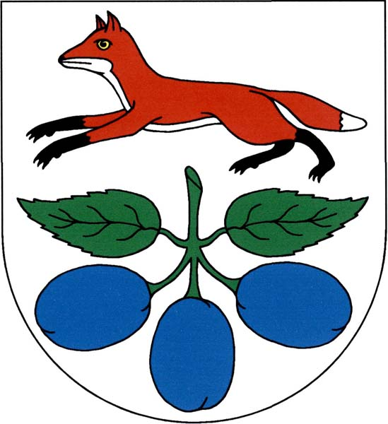 Znak obce Horní Slivno